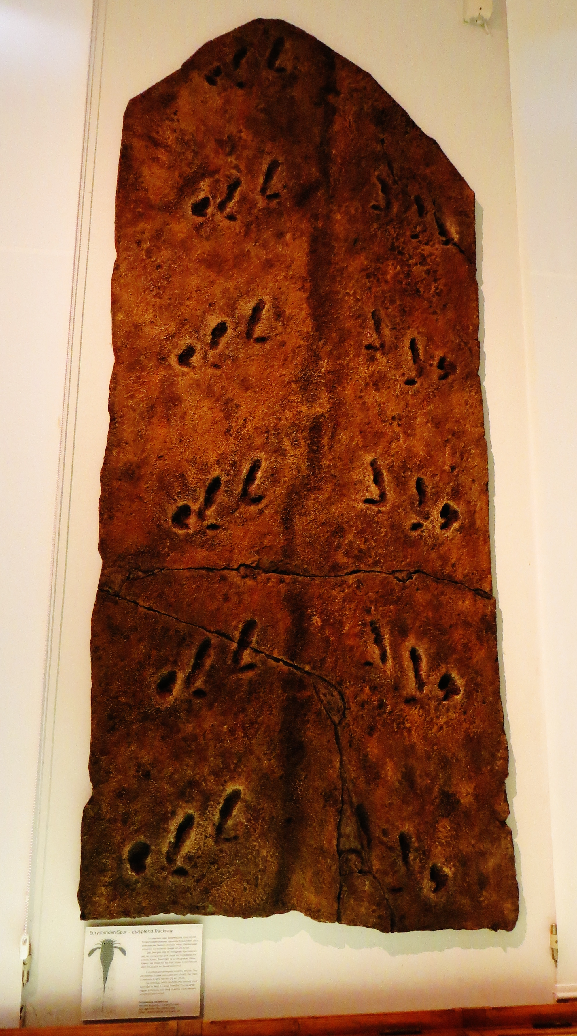 Fossil of eurypterid trackways- Took the picture at Museum of Paleontology of Tuebingen